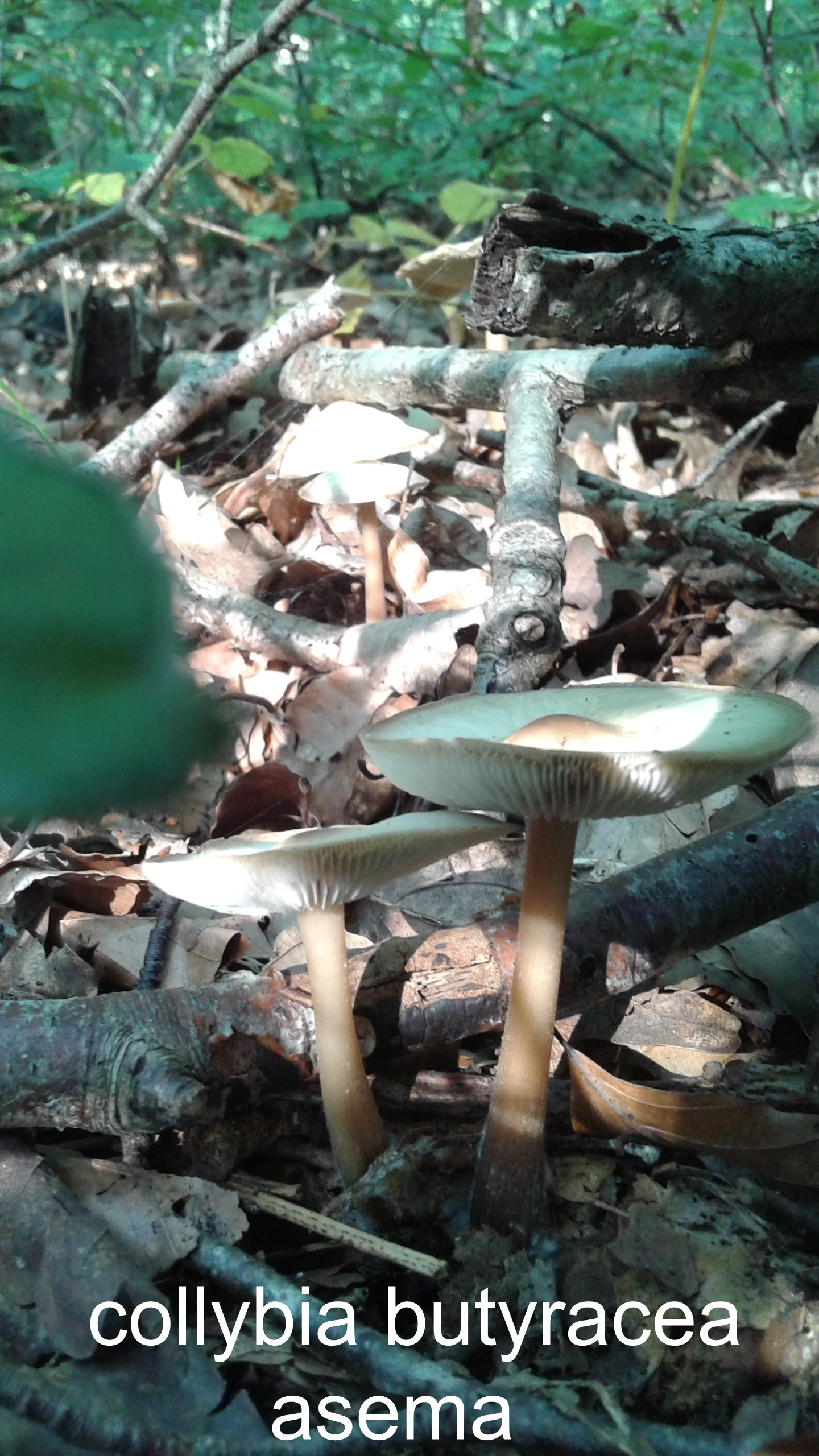 collybie beurrée, collybia butyracea var. asema (nord pas de calais) par temps sec